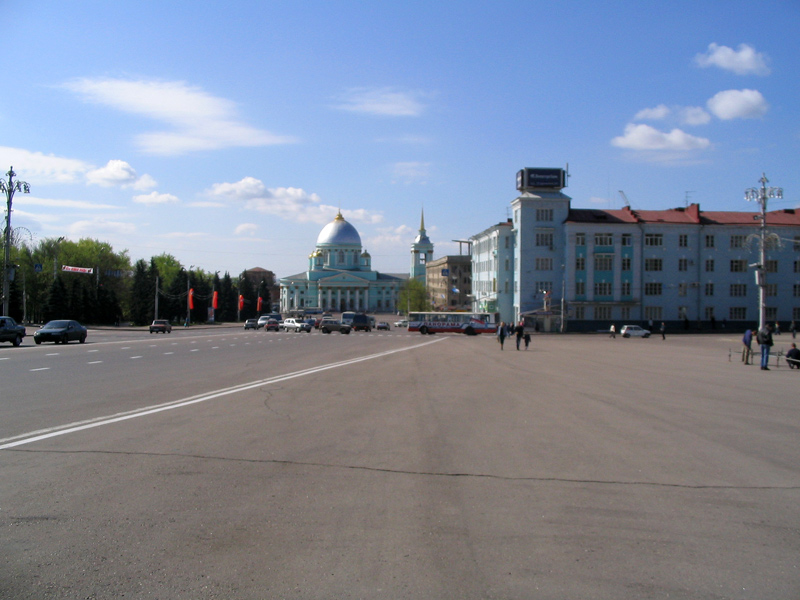 Курск